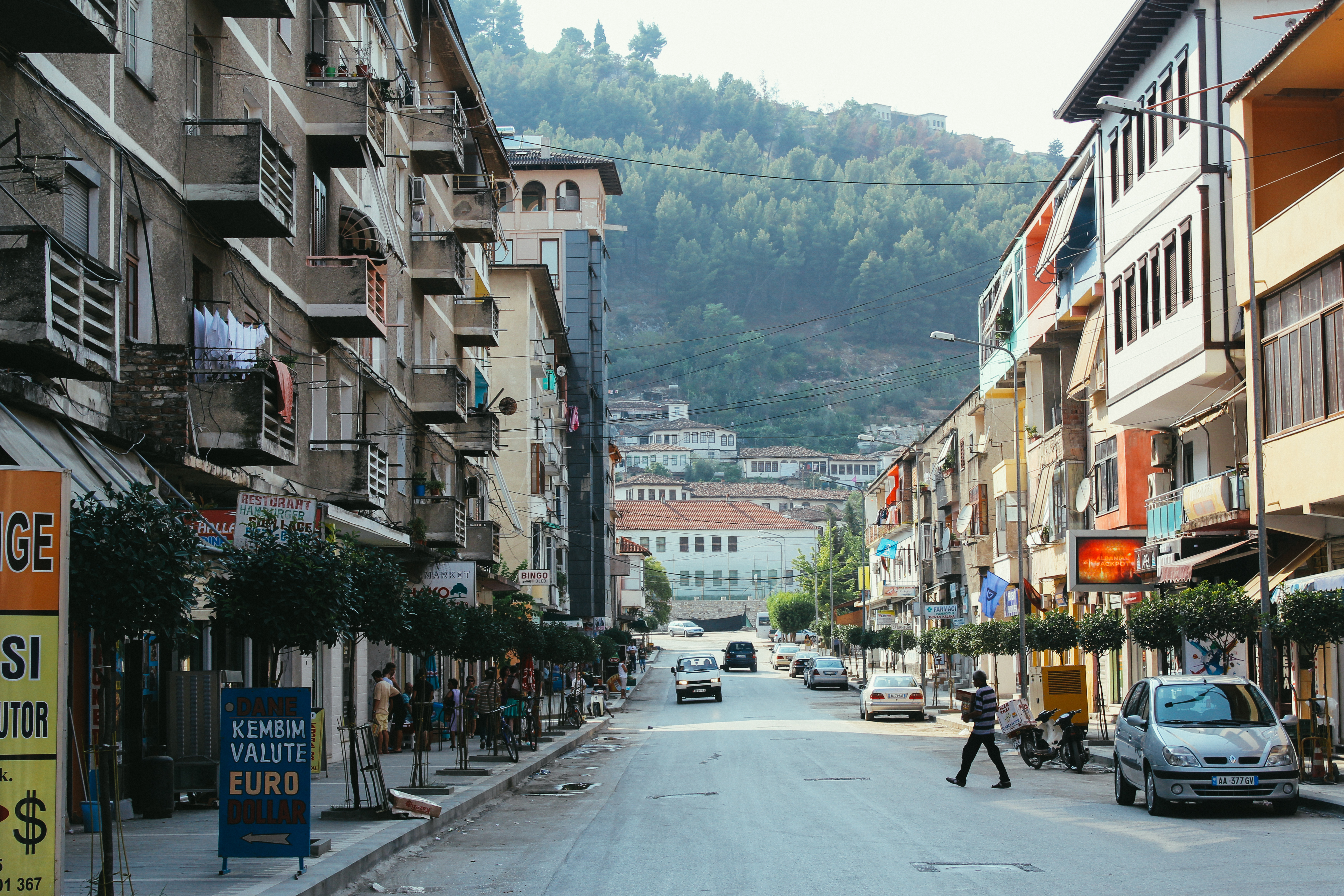 Улица в Берате